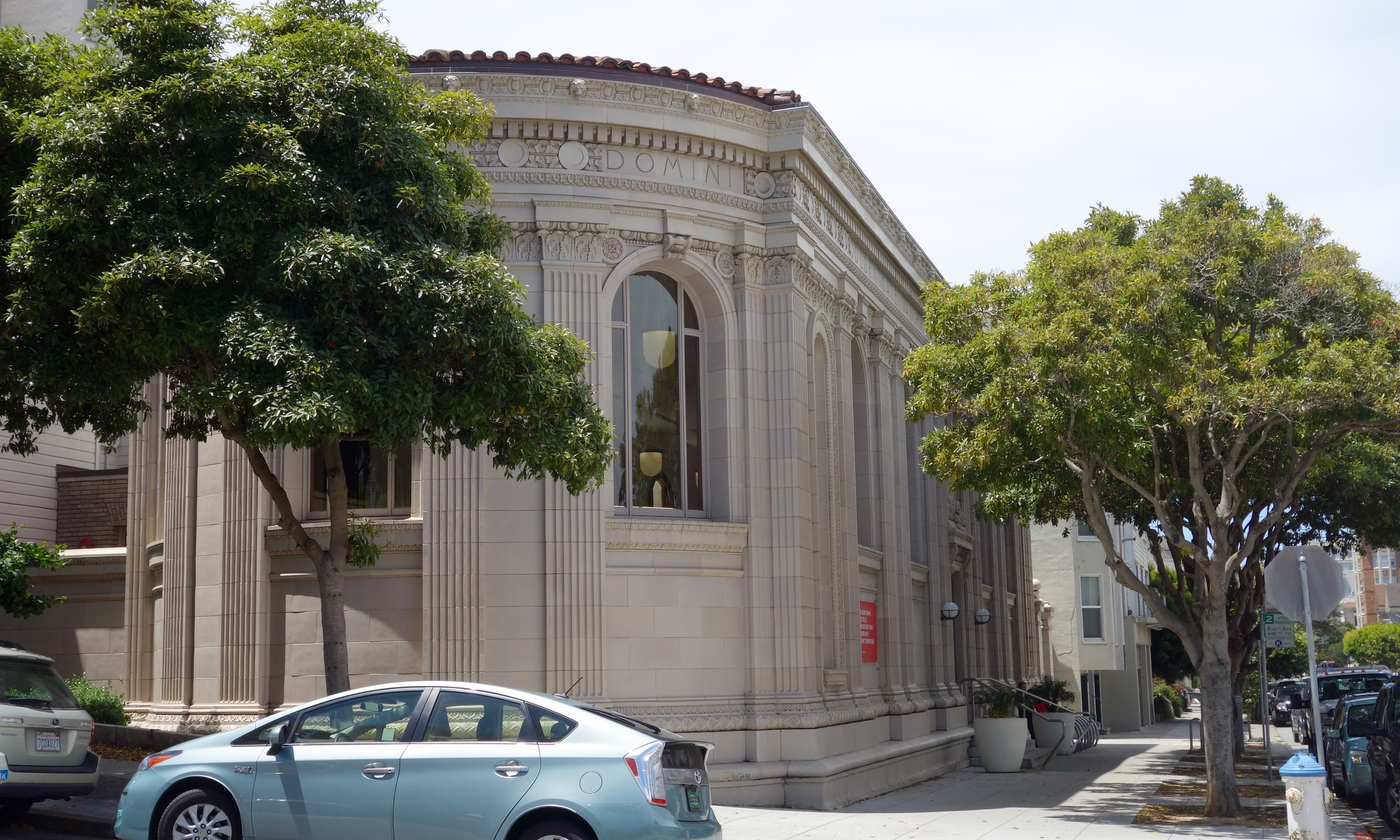 Golden Gate Valley Branch